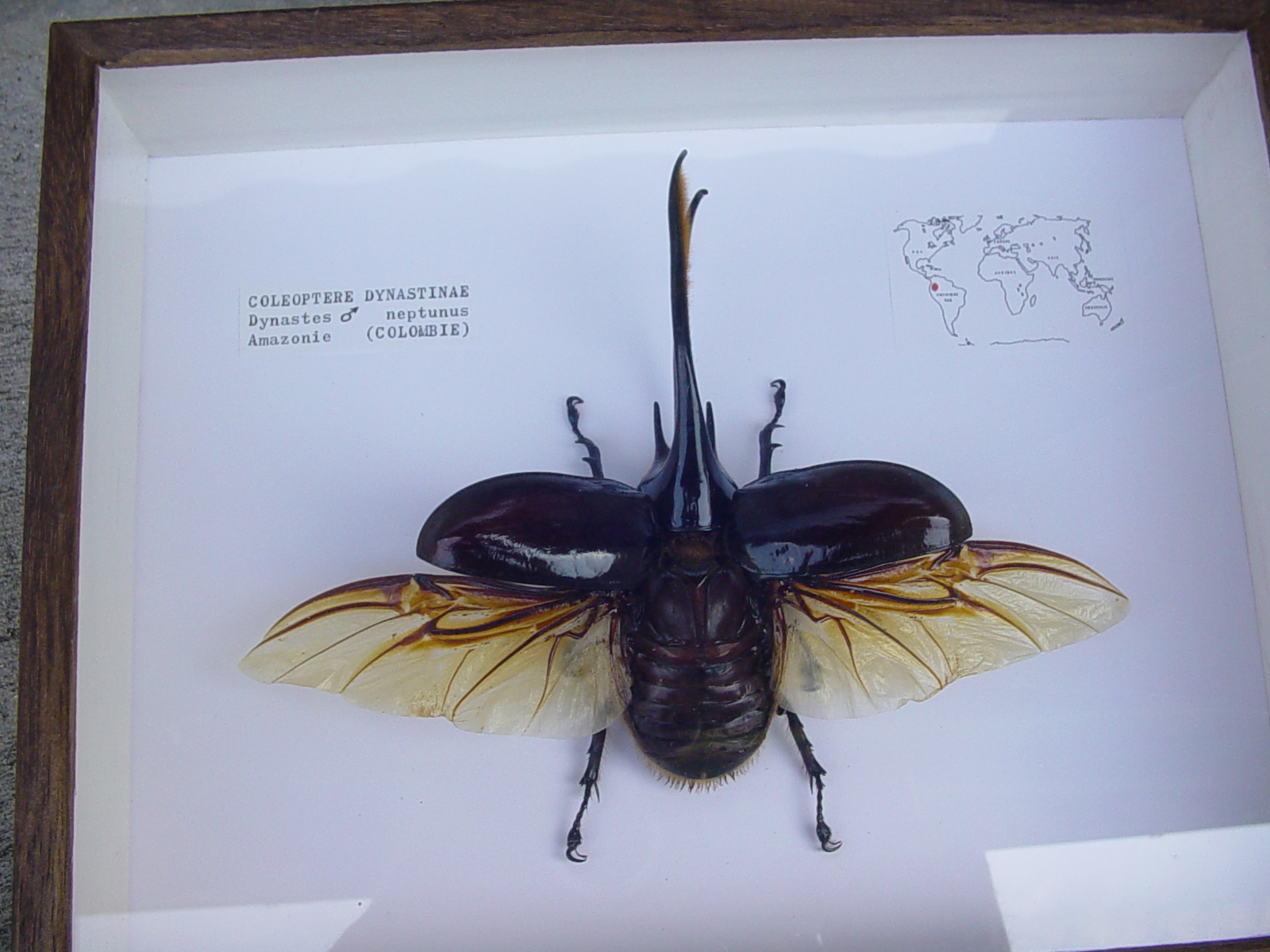 Collection personnelle de JihemD0, capturé en Colombie par M Leuk G.